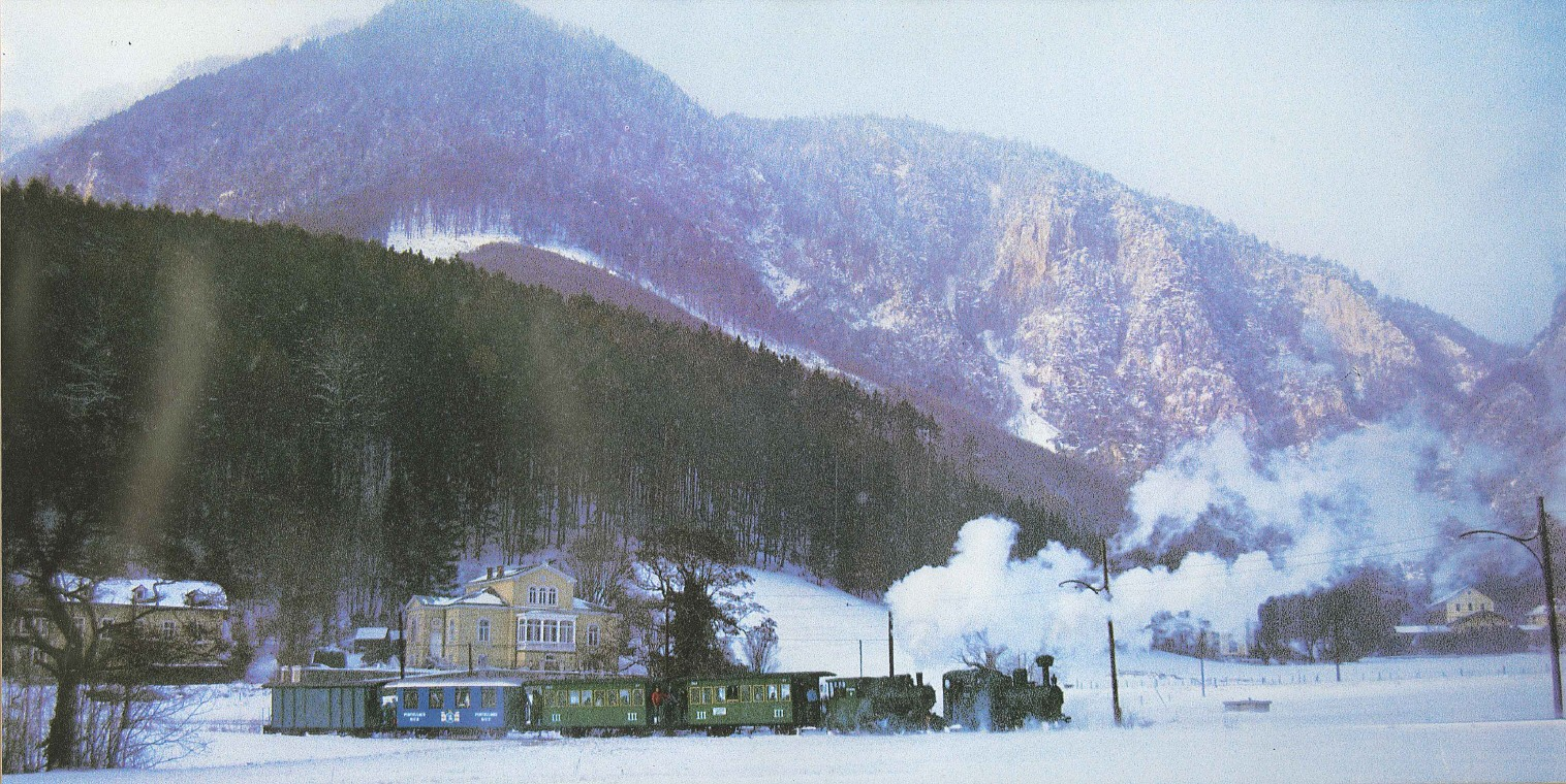 Reichenau - Dampfzug in Doppeltraktion - Schleife Thalhofstraße